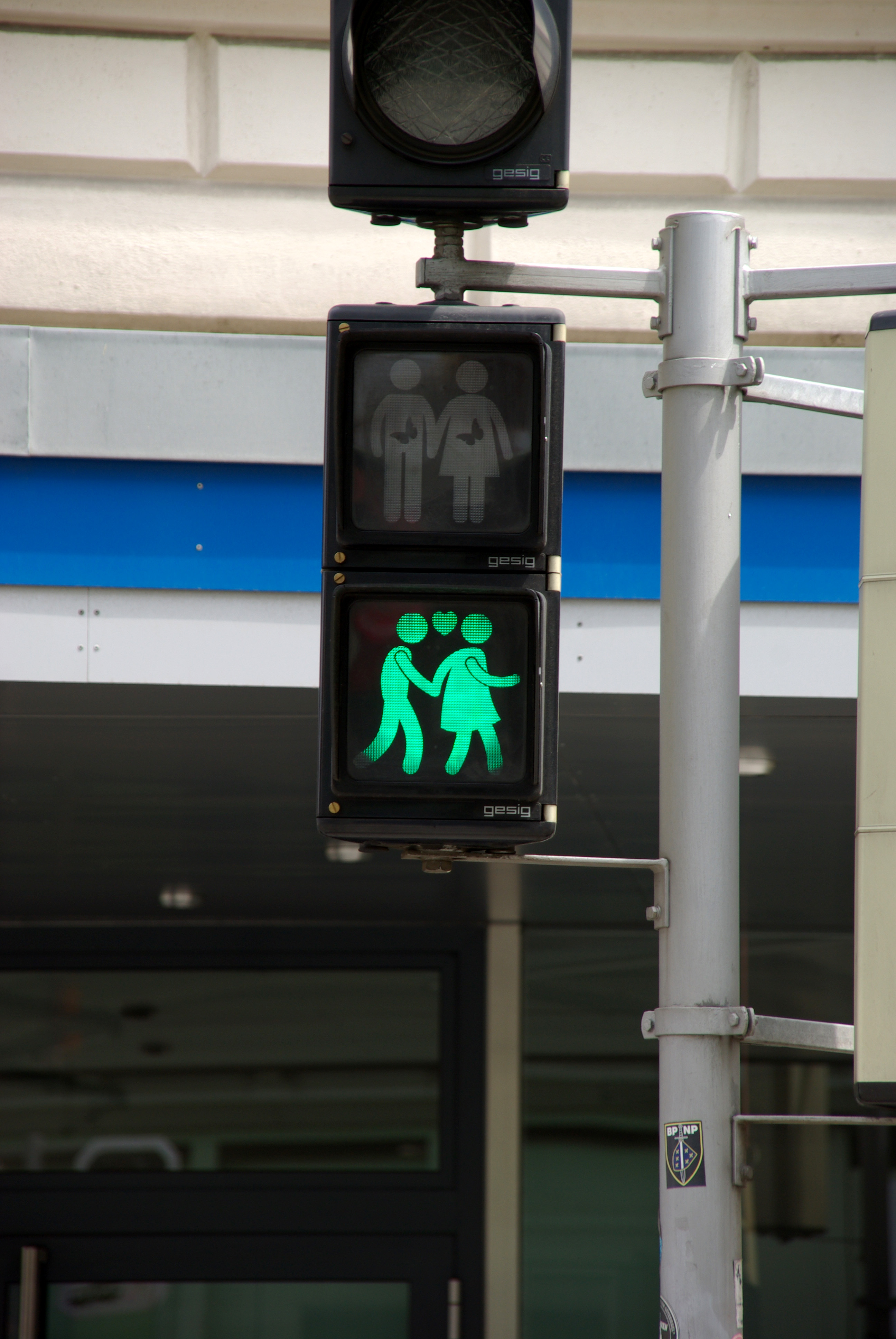 Vienna, Wien, Wenen